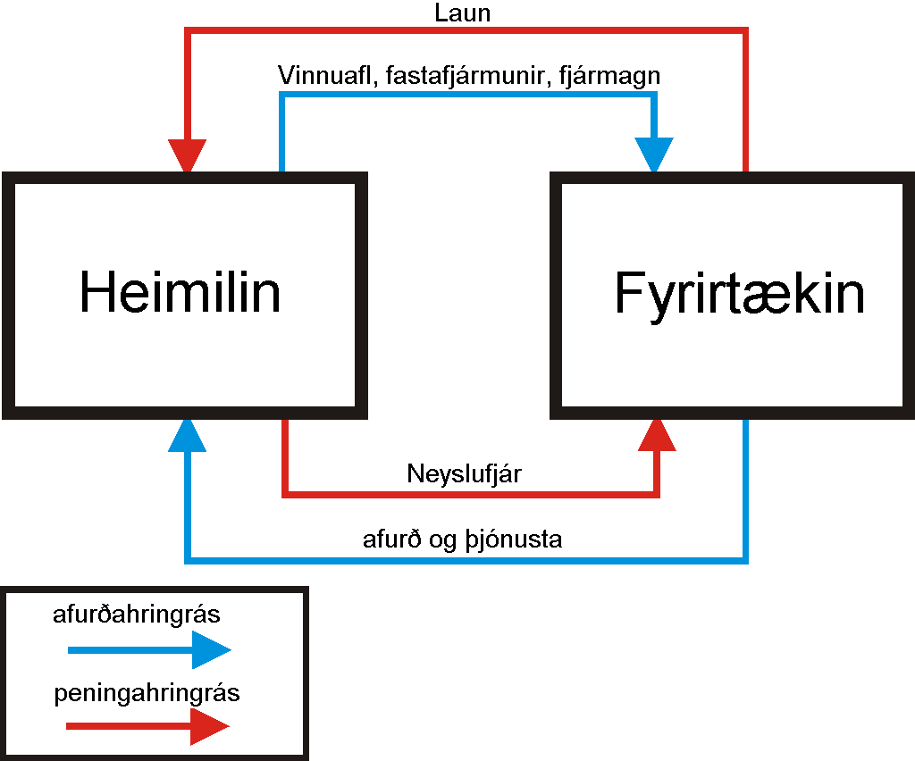 Verðmætahringrás.